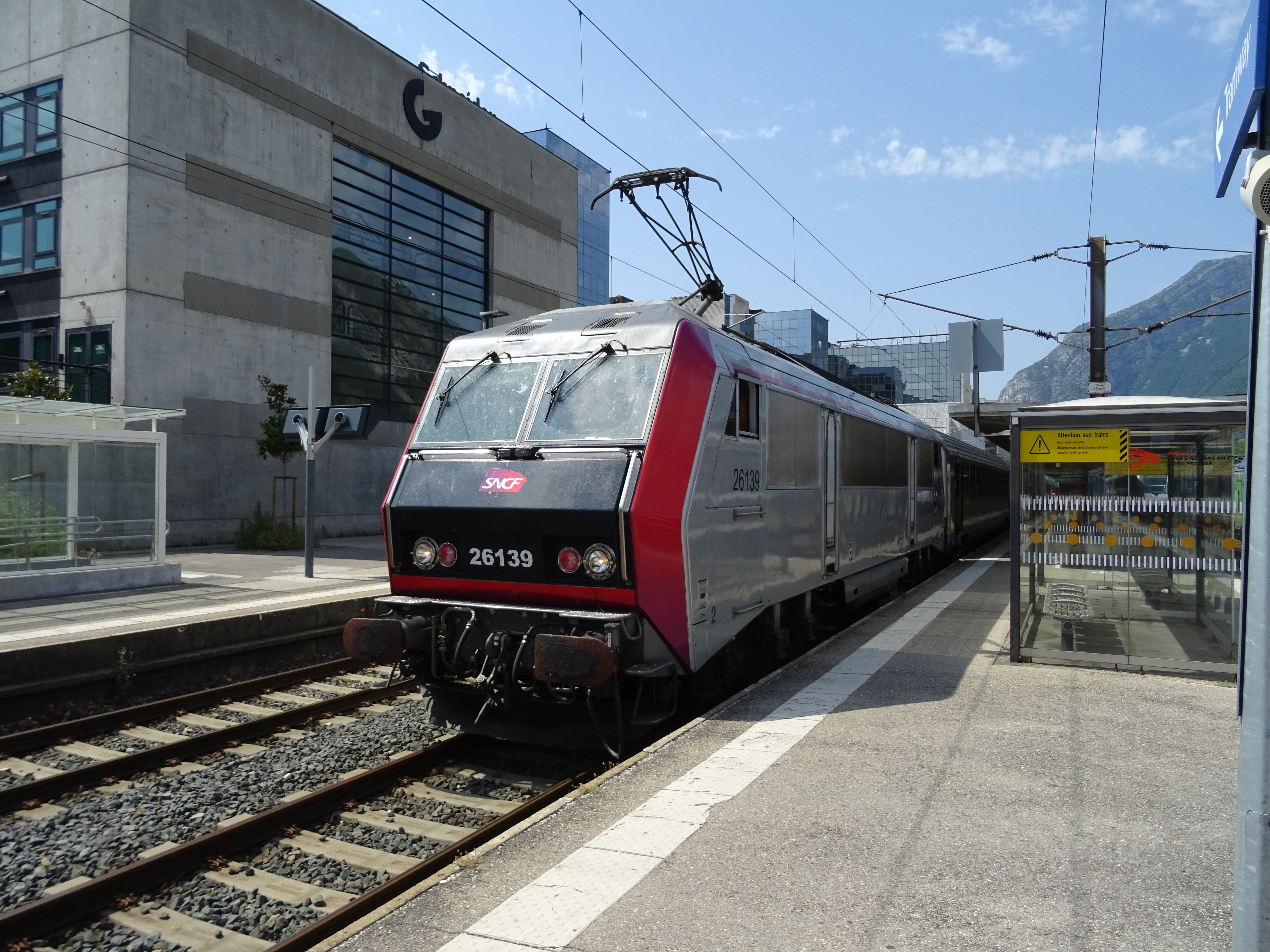 Sybic au crochet d'un IC 100% éco Paris-Bercy - Grenoble en gare de Grenoble.